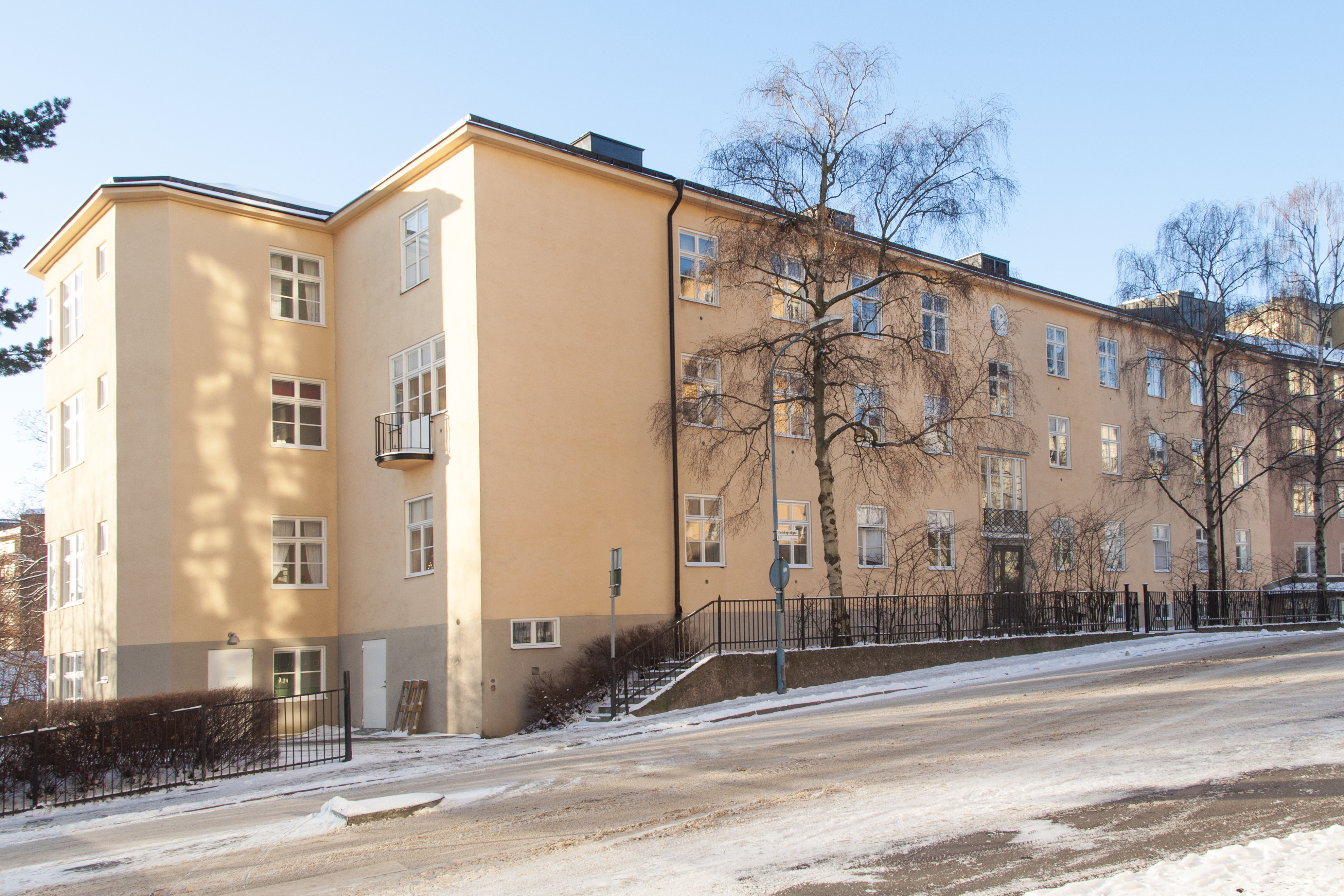 Finsenhemmet, Stadshagsvägen 5. Byggnadsår 1932. arkitekt Karl Güettler